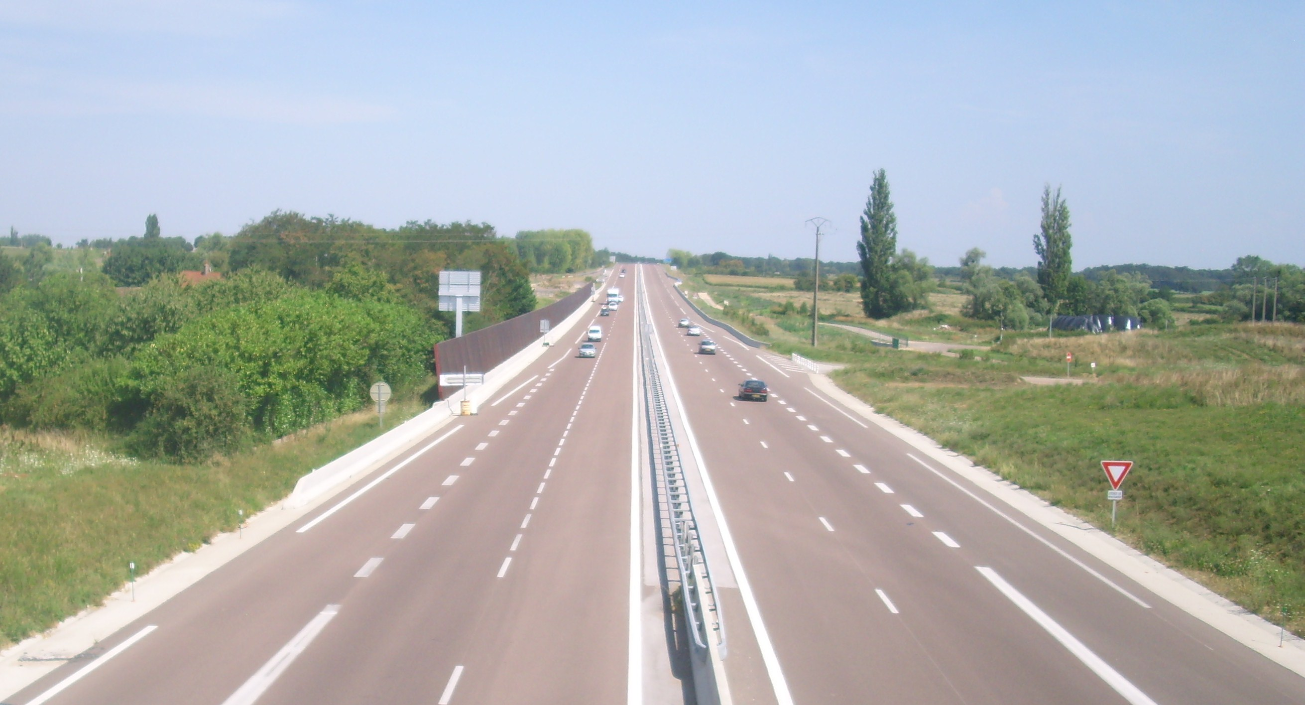 Vue de la Route Nationale 80 à Saint-Desert